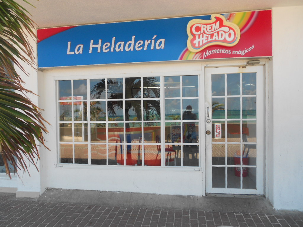 La Heladería Crem Helado, situado en el archipiélago de San Andrés, Colombia.